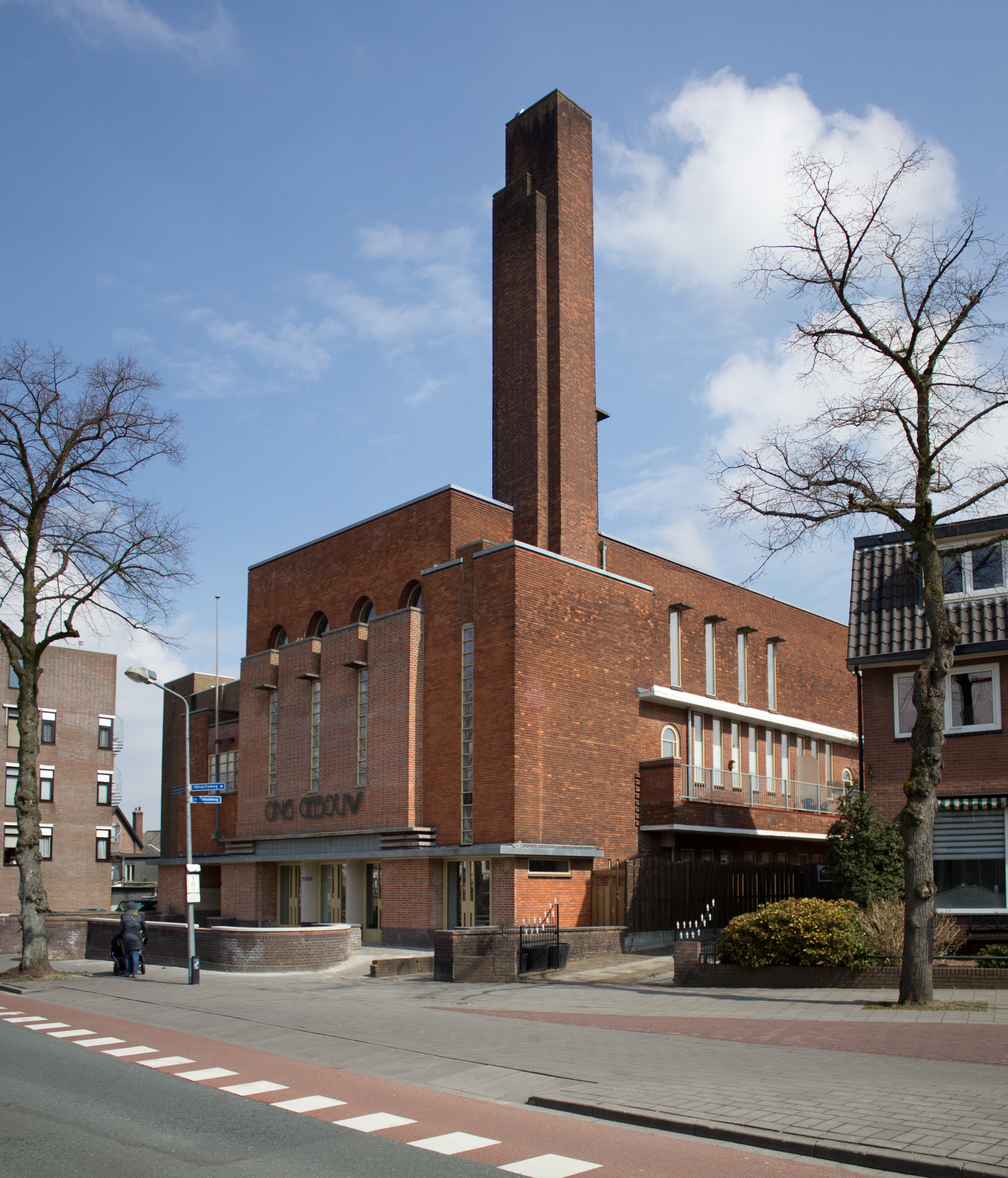 Hilversum, Havenstraat 139